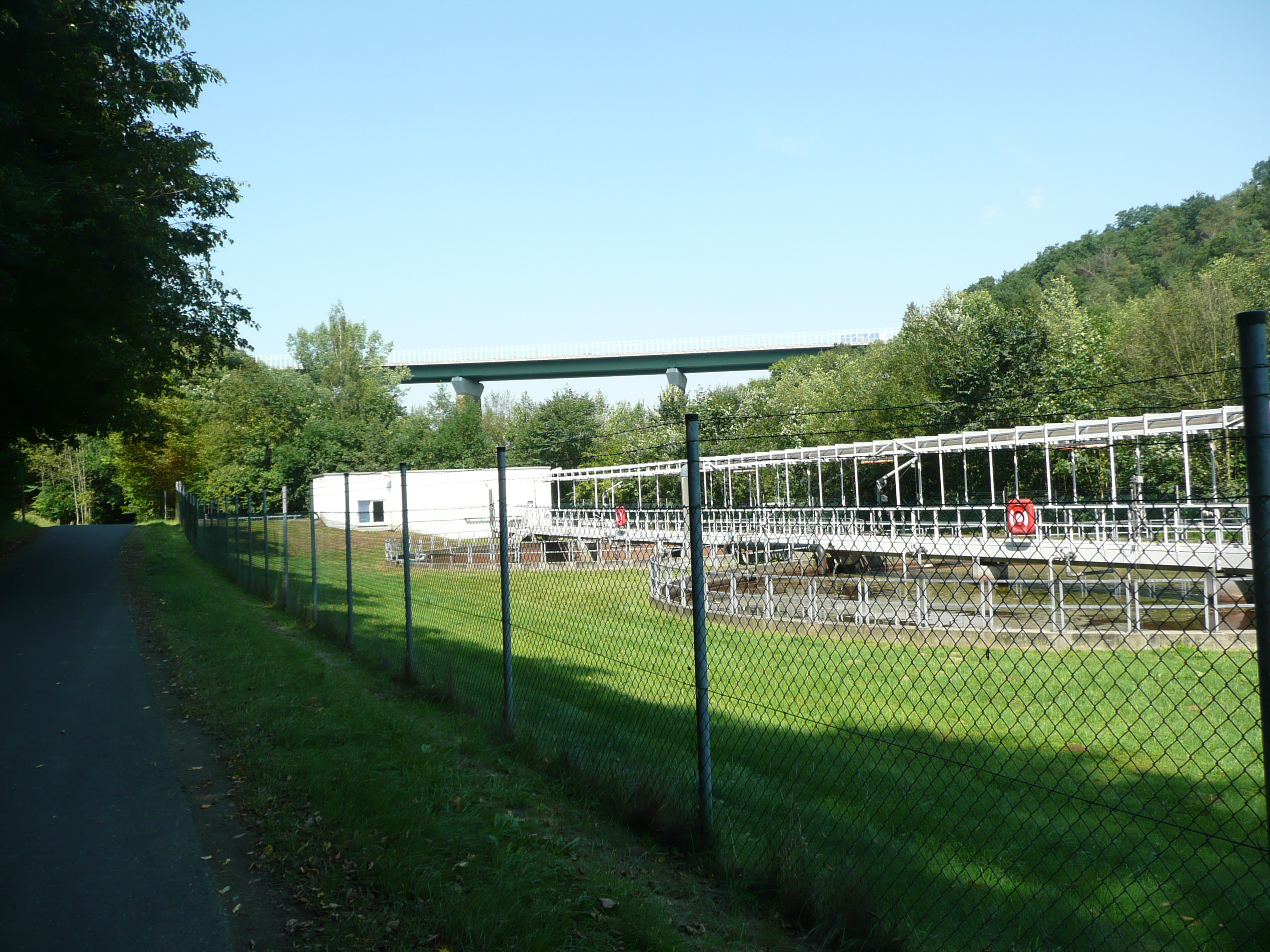 An der Stelle des heutigen Wasserwerkes befand sich früher die Haltestelle Siebenlehn der Schmalspurbahn Wilsdruff-Nossen